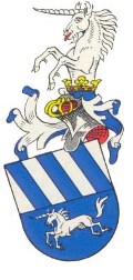 Wappen der bayerischen Adelsfamilie der Freiherrn von Horn (1783)